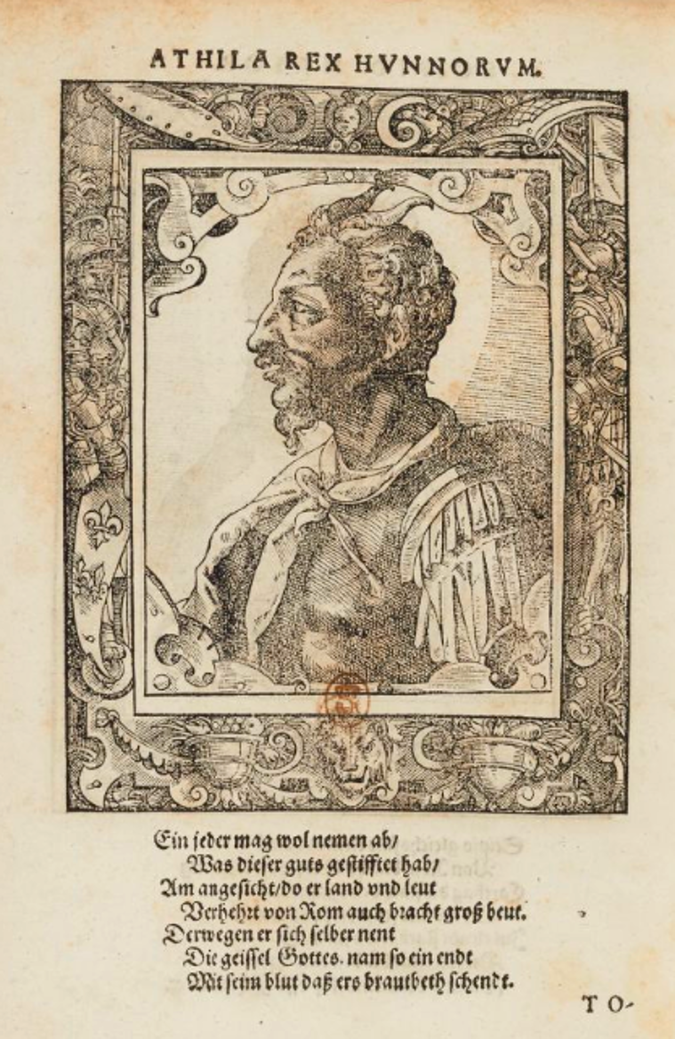 Eigentliche und gedenkwürdige Contrafacturen oder Anbildungen wolverdienter unnd Weitberümter Kriegshelden, aus des hochwurdigen Bischoffs Pauli Jouij elogijs oder Rhumschrifften gezogen, sampt deren jeder angehencken summarischen Reimen [...] / durch Theobaldum Müller von Marpurck